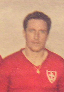 Il calciatore Guglielmo Trevisan con la maglia della Triestina Calcio Lo Sport illustrato, edizione 1954, Milano, Edizioni della Gazzetta dello Sport Trevisan, Guglielmo